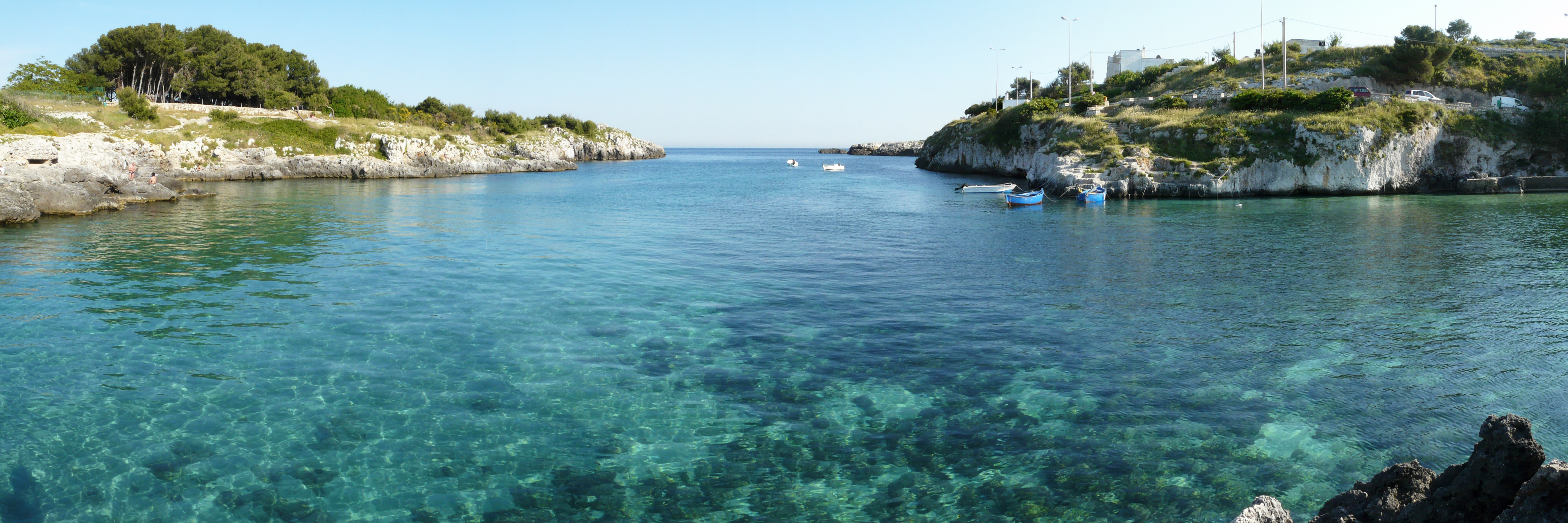 Panoramica del mare di Porto Badisco